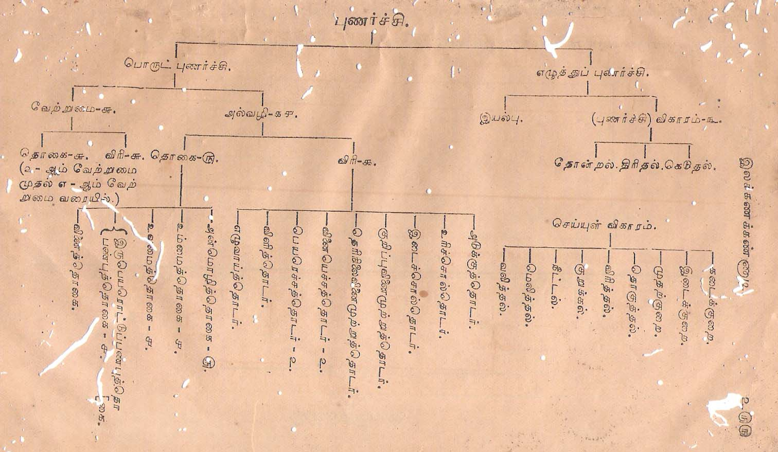 தமிழ்